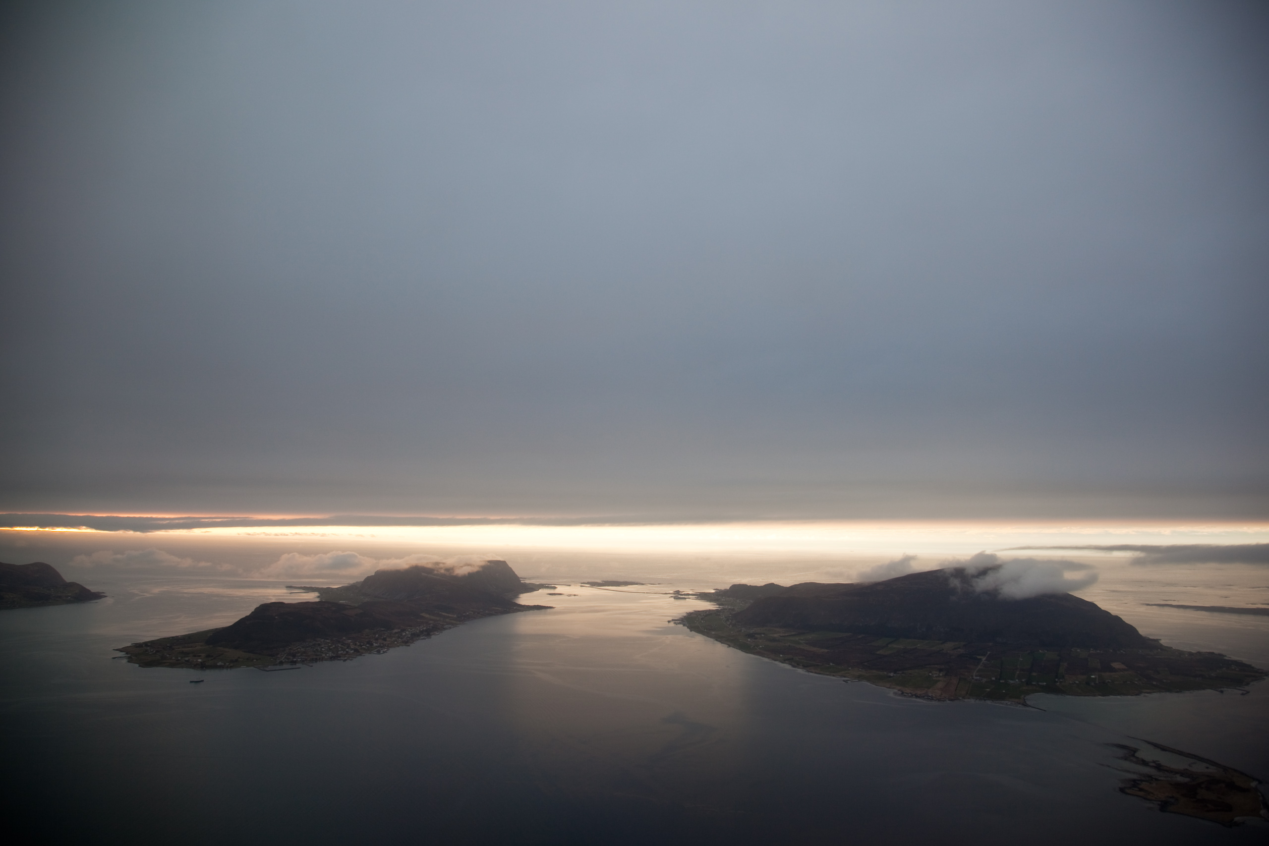 Longvafjoden mellom Haramaøya til venstre og Skuløya/Flemsøya til høgre. Ullaholmen og Ullasundbrua mellom øyene lengst ute.